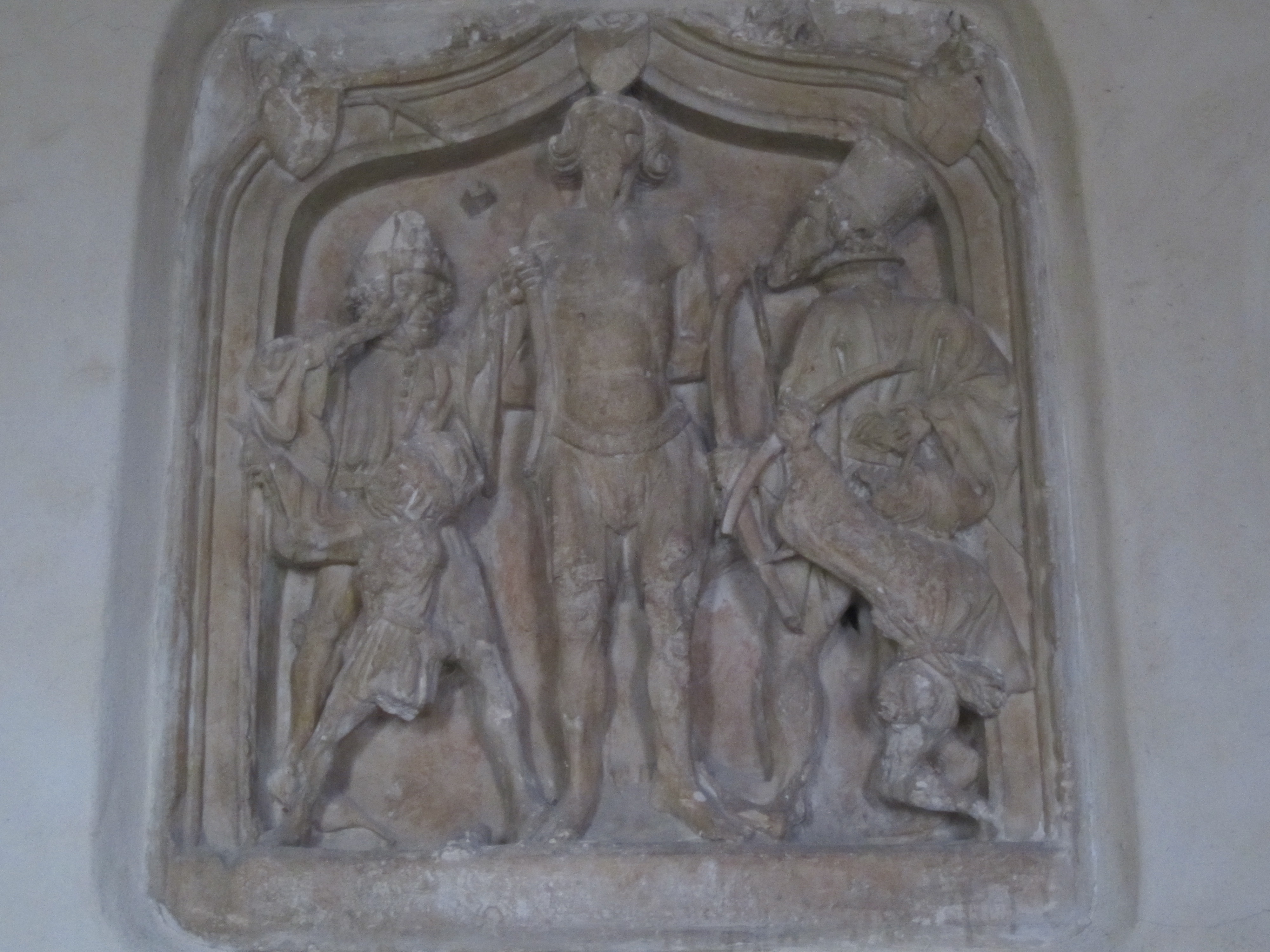 La Vendelée, Manche